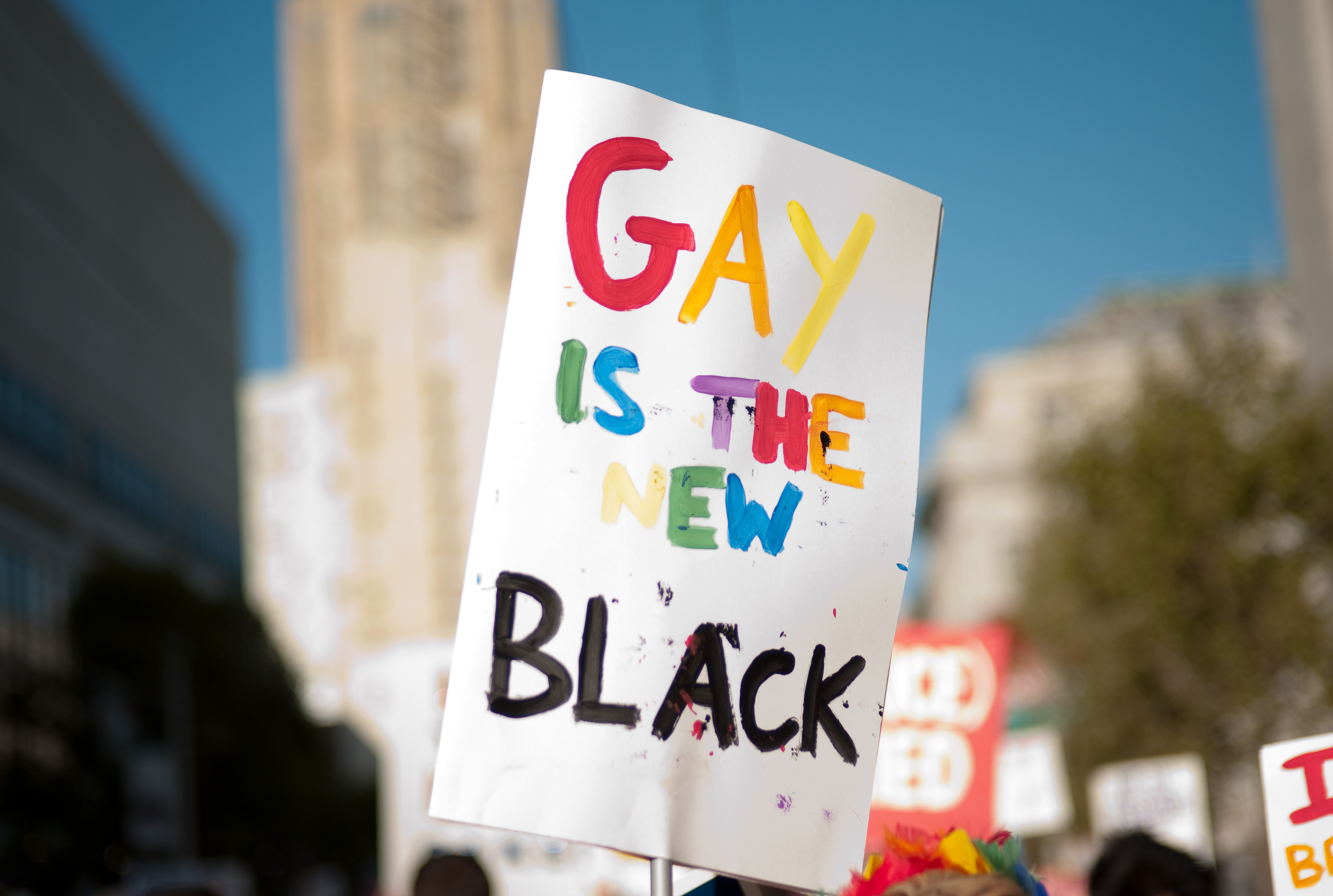 Manifestazione per il rigetto della referendum California Proposition 8.